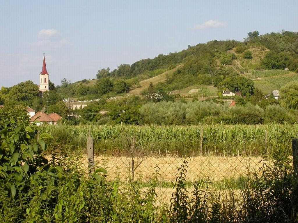 Pohľad na obec Licensing Autorom fotografie je Imrich Šimonek z Dubníka Kategória:Presunúť_na_Commons